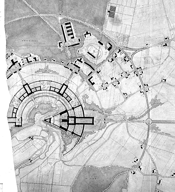 План гиммлеровской перепланировки Вевельсбурга и окрестностей (1944).